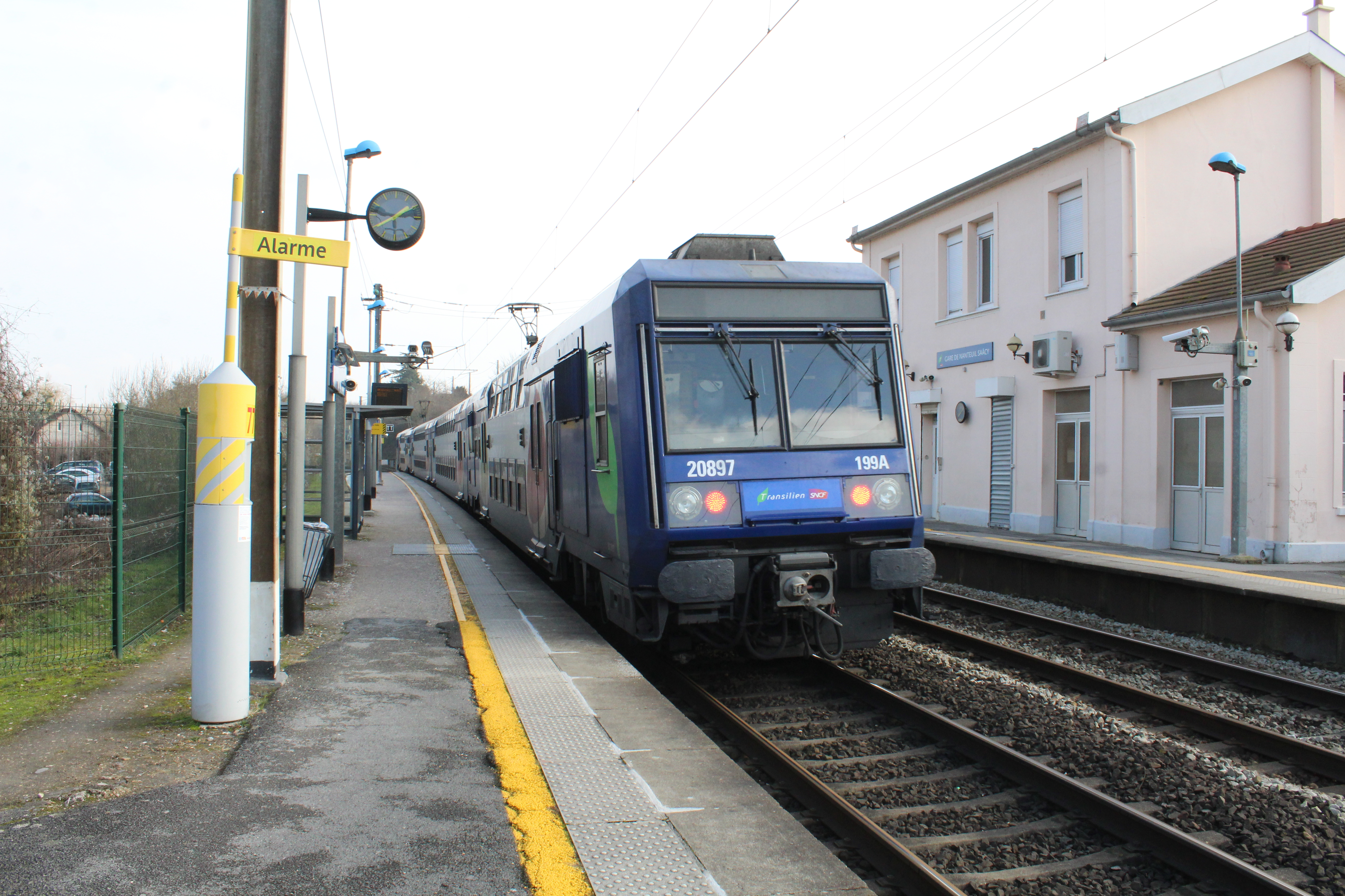 Gare de Nanteuil - Saâcy.